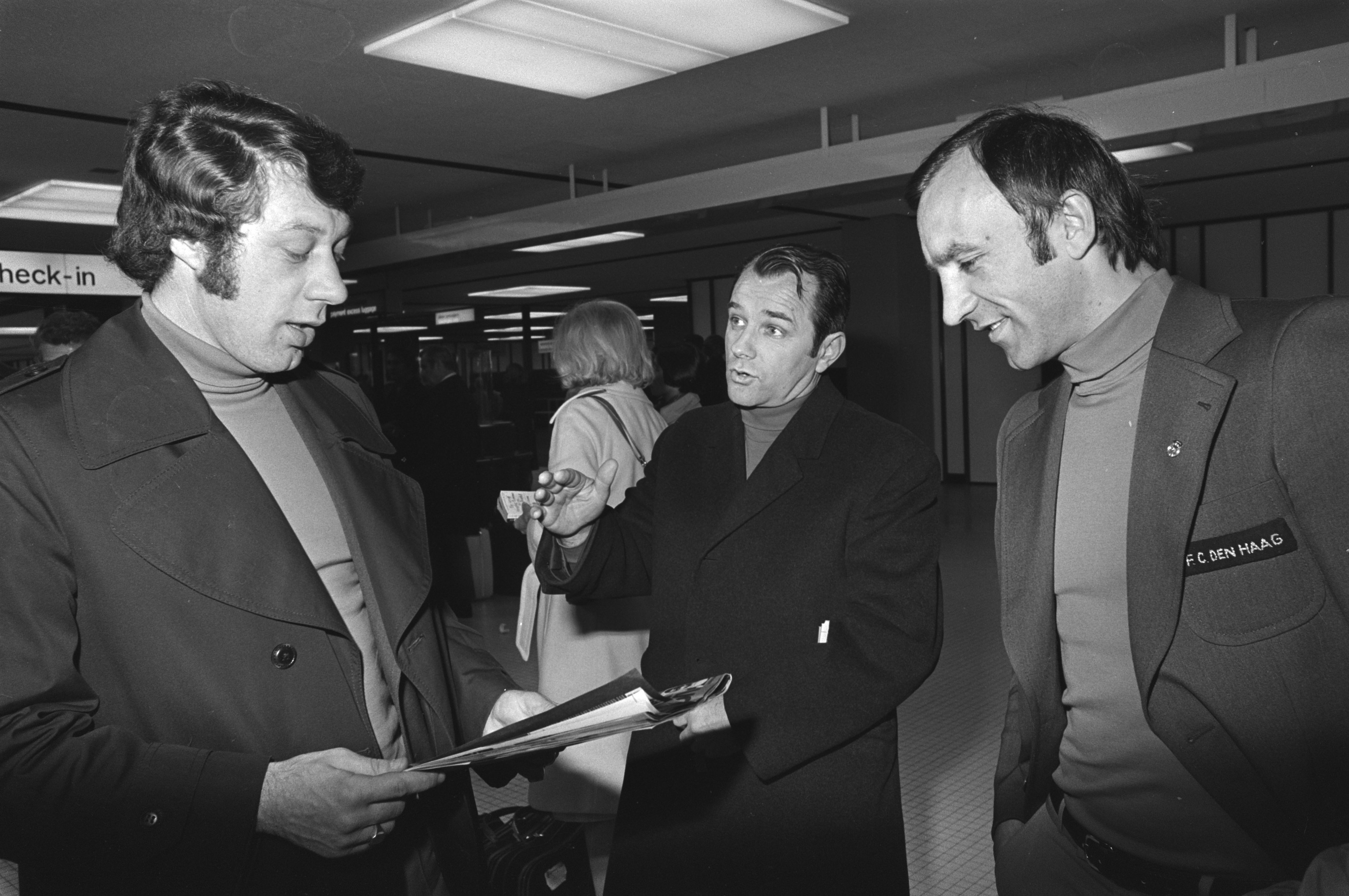 Le FC Den Haag à l'aéroport d'Amsterdam-Schiphol avant de s'envoler pour Londres en vue de rencontrer West Ham United. Photographie de Aad Mansveld (à gauche), l'entraîneur Vujadin Boškov (au centre) et Dojčin Perazić (à droite) par R. Mieremet / Anefo.